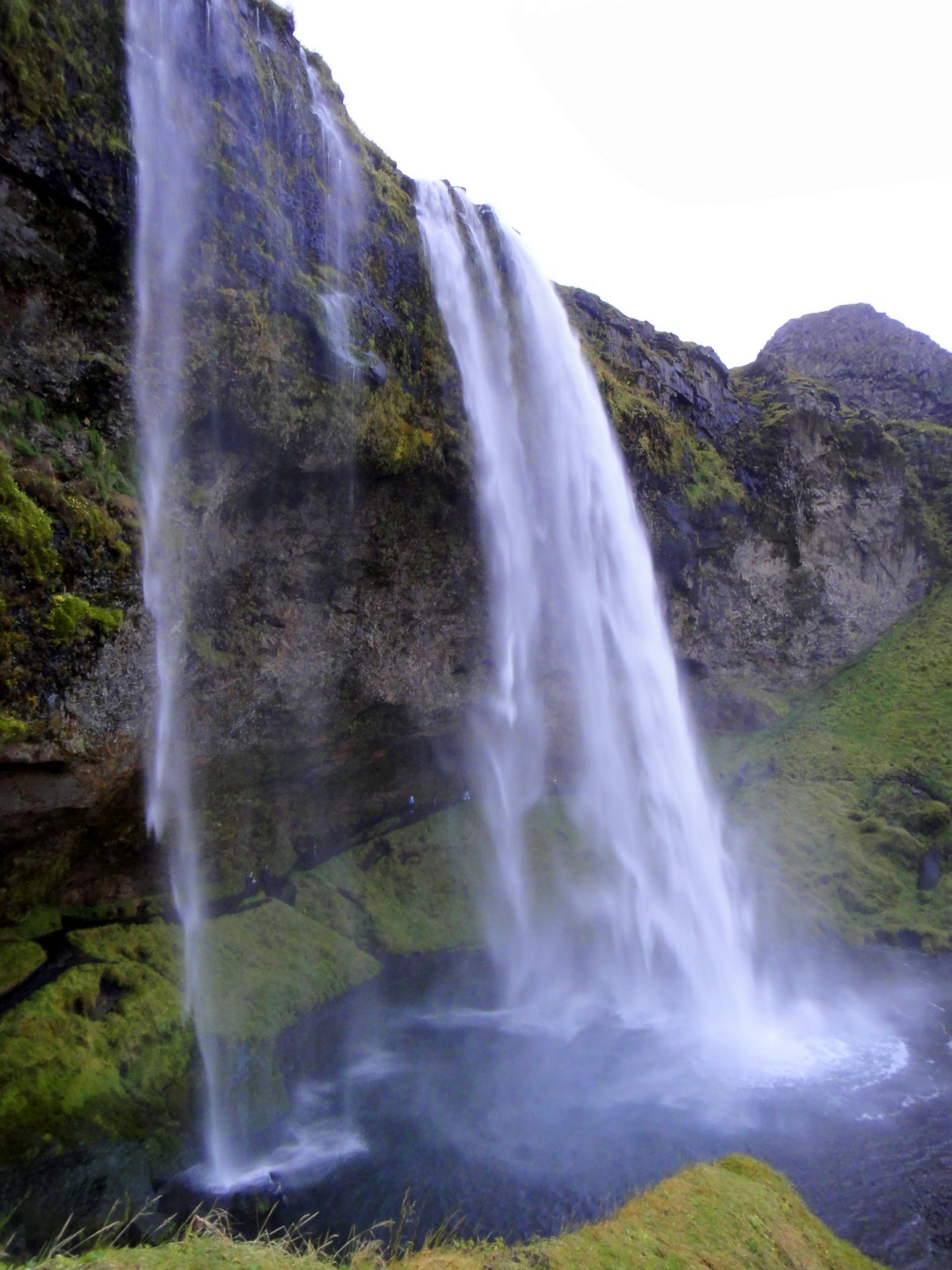 Seljalandsfoss